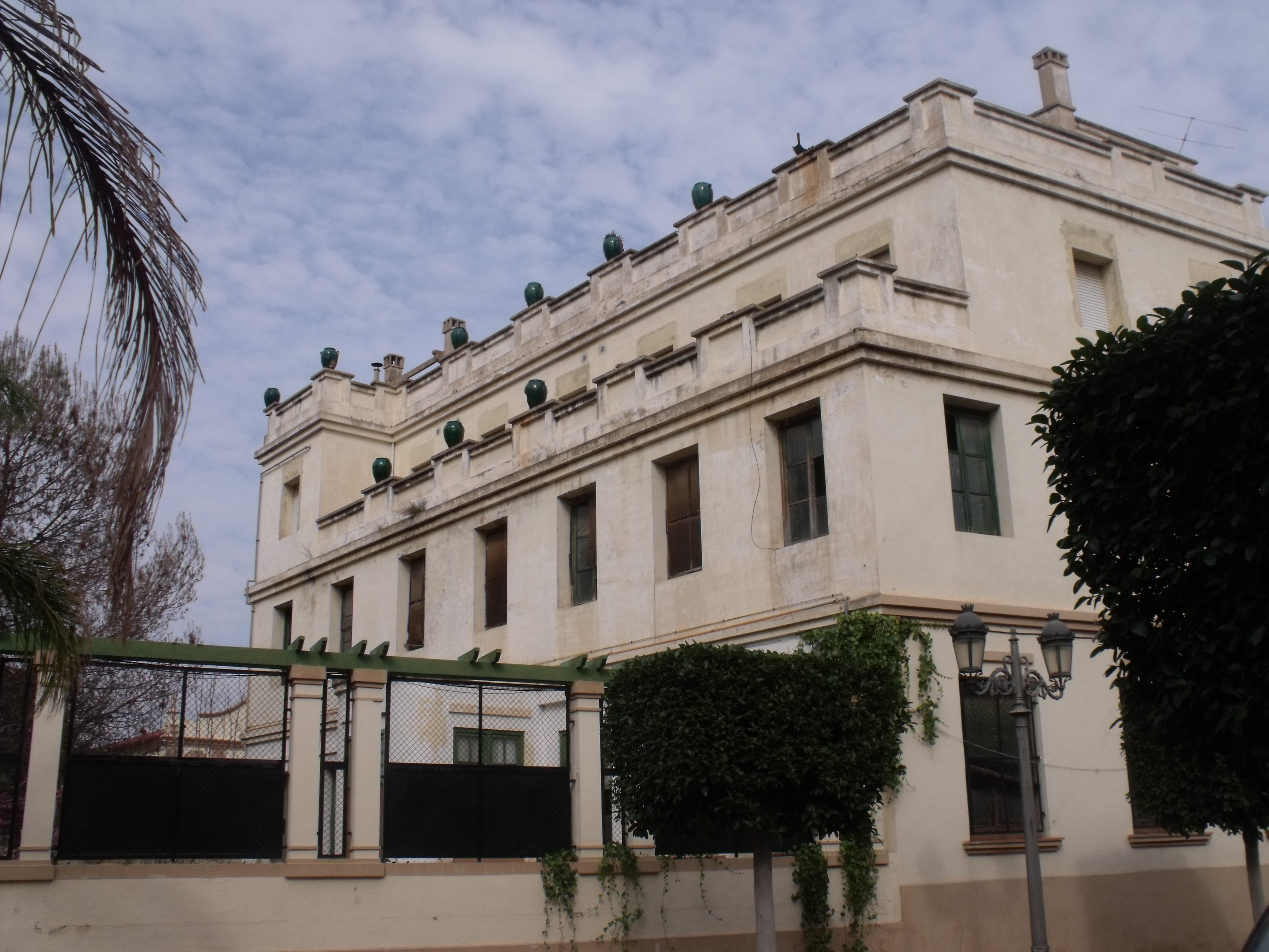 Vista general de uno de los edificios de los cuarteles de Paterna.